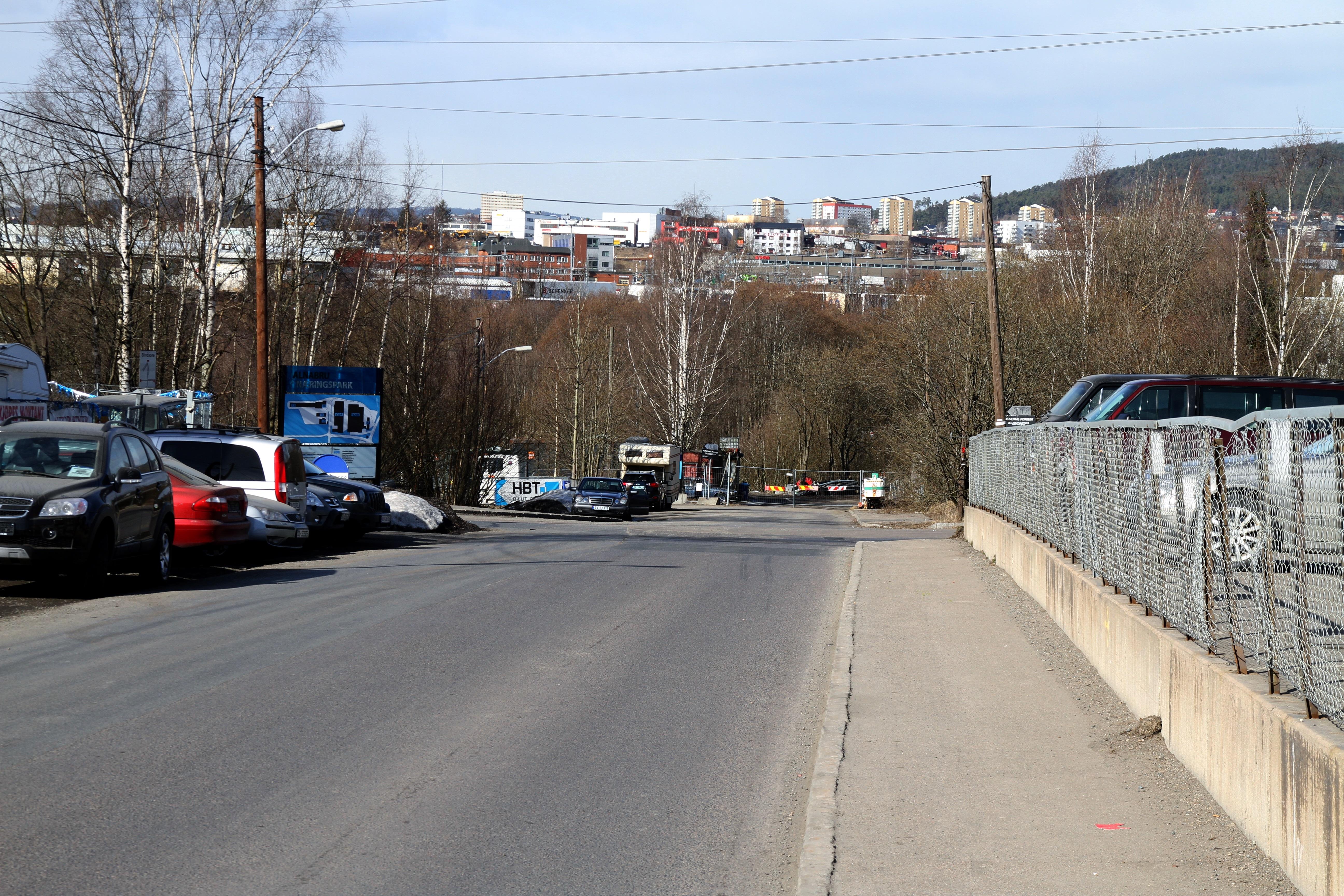 Arvesetveien på Alnabru i Oslo.